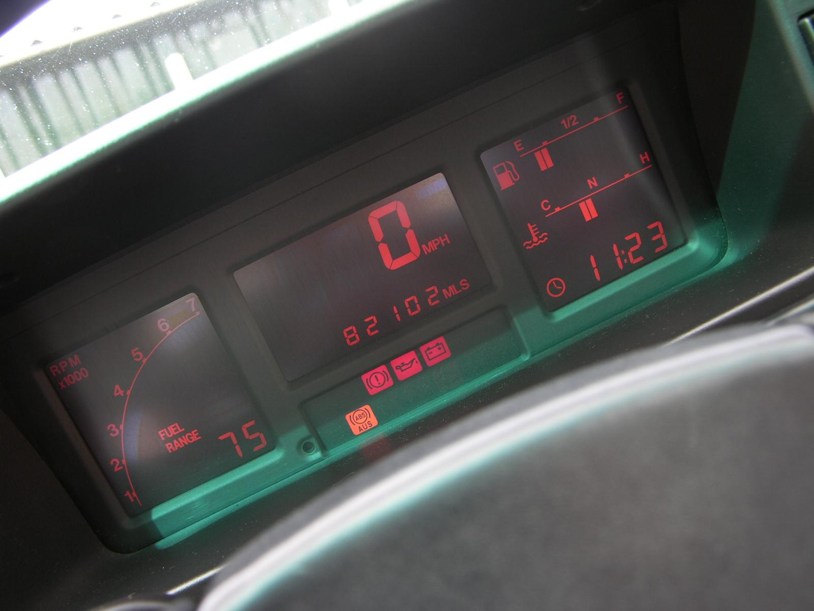 1990 Audi Quattro 20V